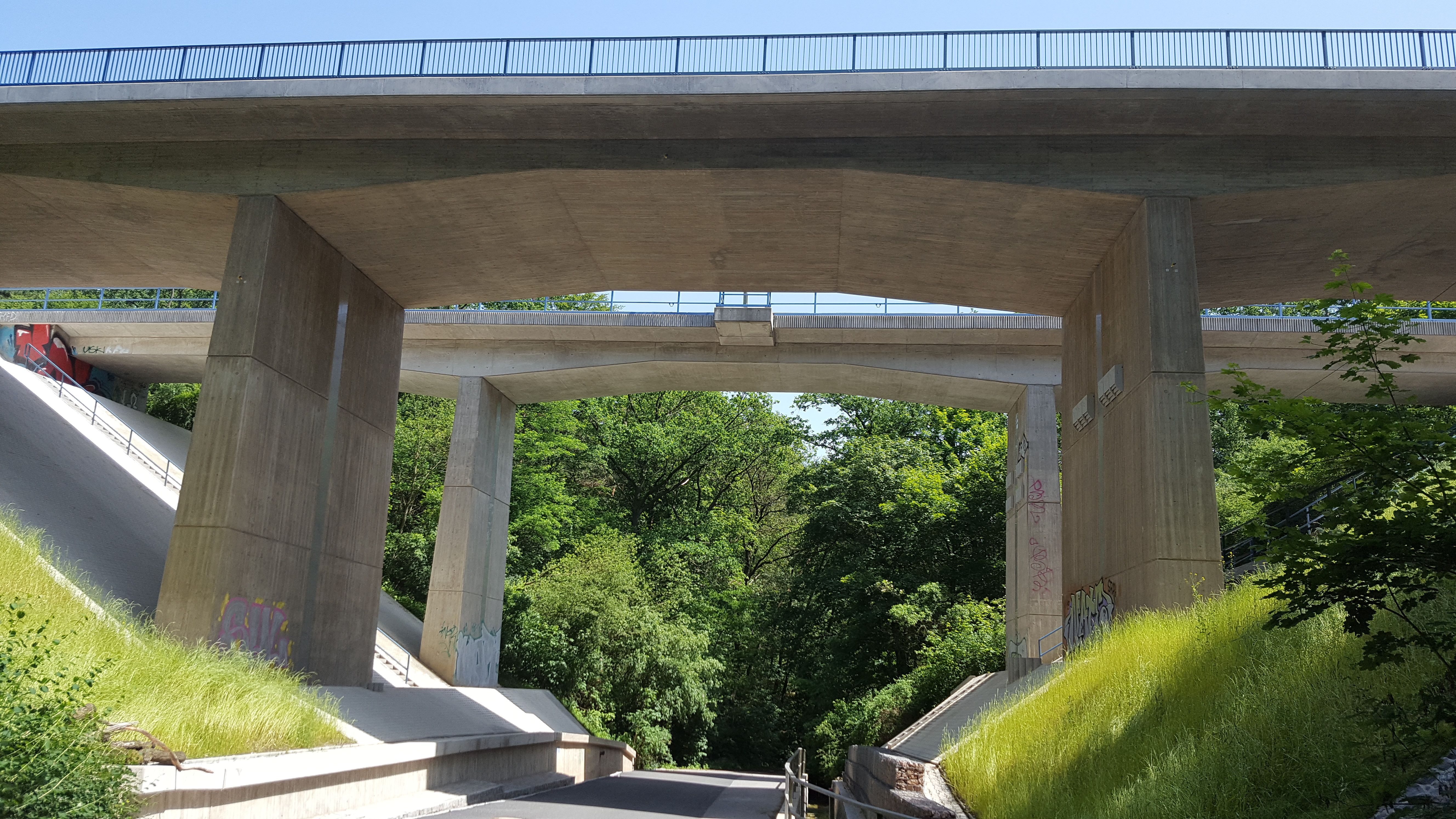 Nach knapp 170 Jahren musste die Eisenbahnbrücke über den Nesselgrundweg an der Bahnstrecke Görlitz–Dresden komplett erneuert werden. Der Bund und die Bahn investieren in die Brücke mehr als sechs Millionen Euro